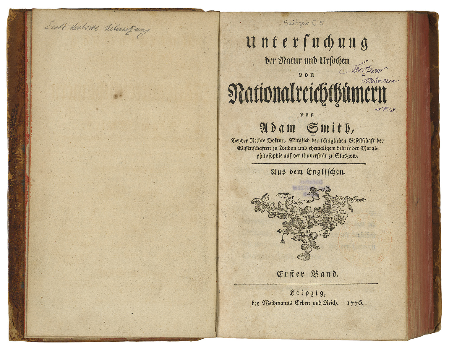 «Untersuchung der Natur und Ursachen von Nationalreichthümern» von Adam Smith in einer Ausgabe von 1776 aus der Sammlung Saitzew in der Zentralbibliothek Zürich - eine deutsche Übersetzung von «An inquiry into the nature and causes of the wealth of nations»